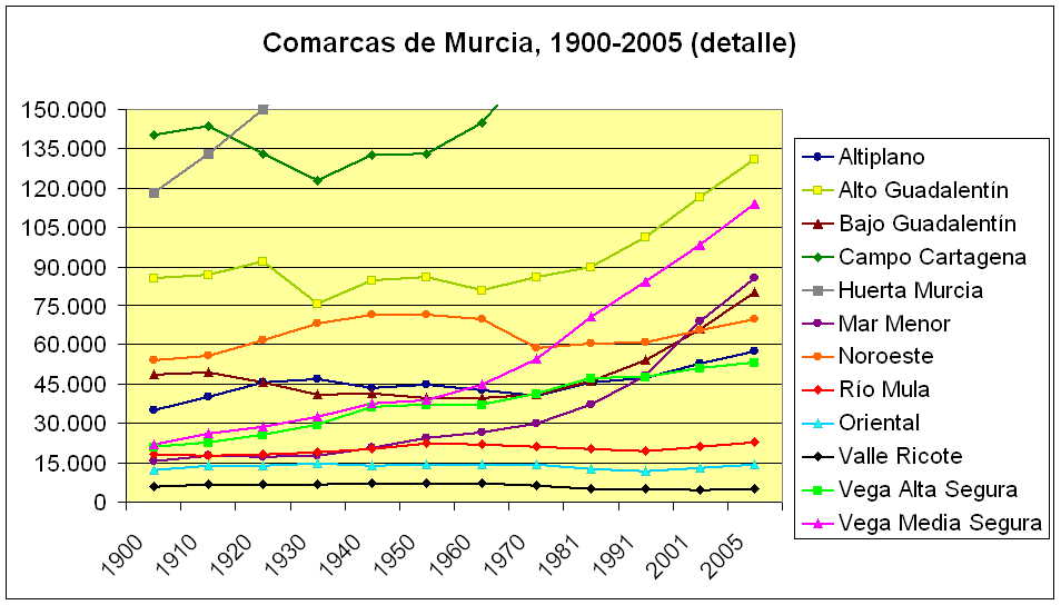 Población del Altiplano (azul oscuro) en el conjunto de comarcas de la región The population of the regions of Murcia (modern distribution), Spain, (1900-2005). Detail image of the less populated: Altiplano, Alto Guadalentín, Bajo Guadalentín, Mar Menor, Noroeste, Río Mula, Oriental, Valle de Ricote, Vega Alta del Segura, and Vega Media del Segura; that is, all except Campo de Cartagena and Huerta de Murcia. Own work, given to PD. Source: Instituto Nacional de Estadística.